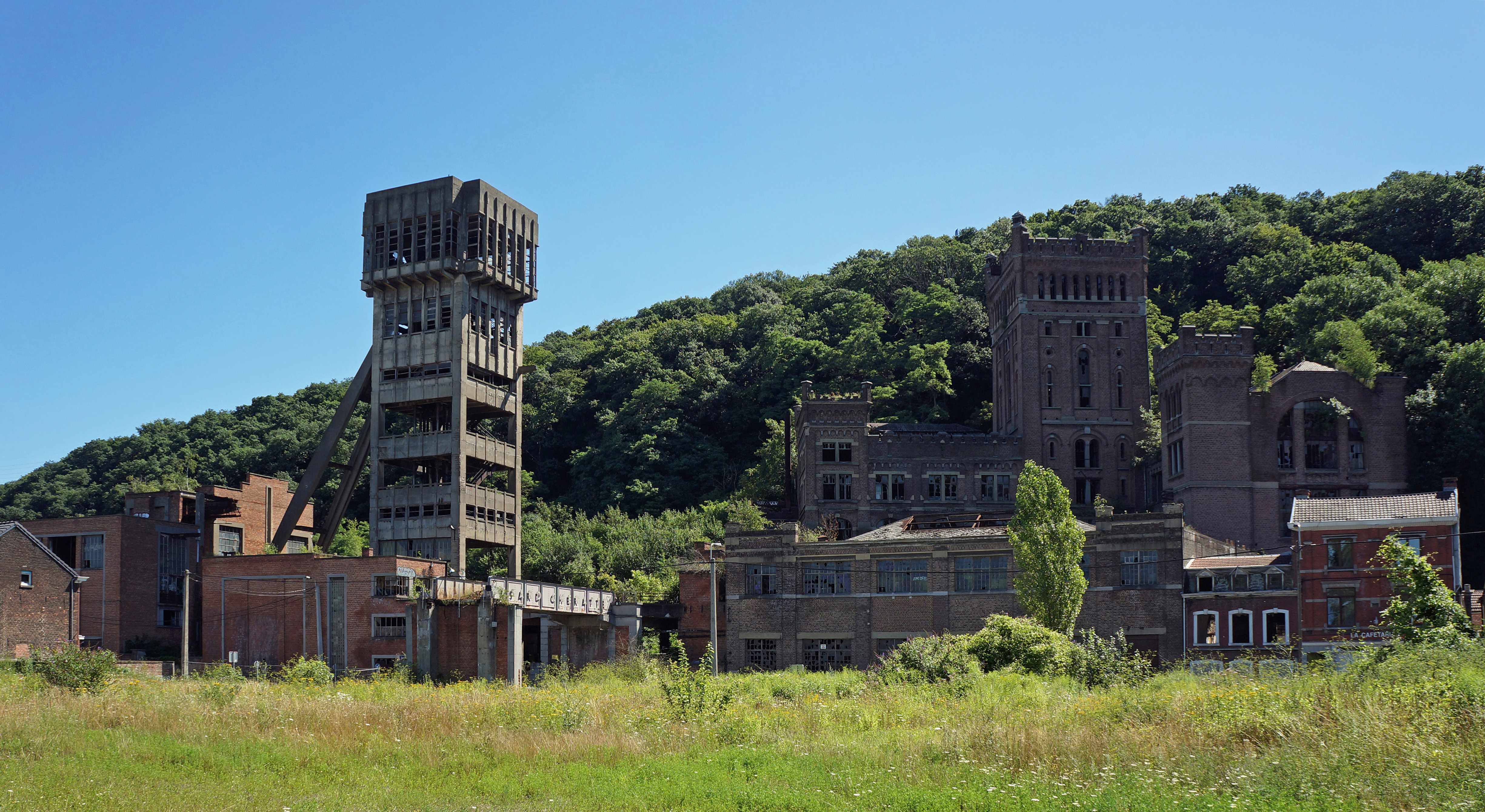 Le charbonnage du Hasard de Cheratte: vue d'ensemble.